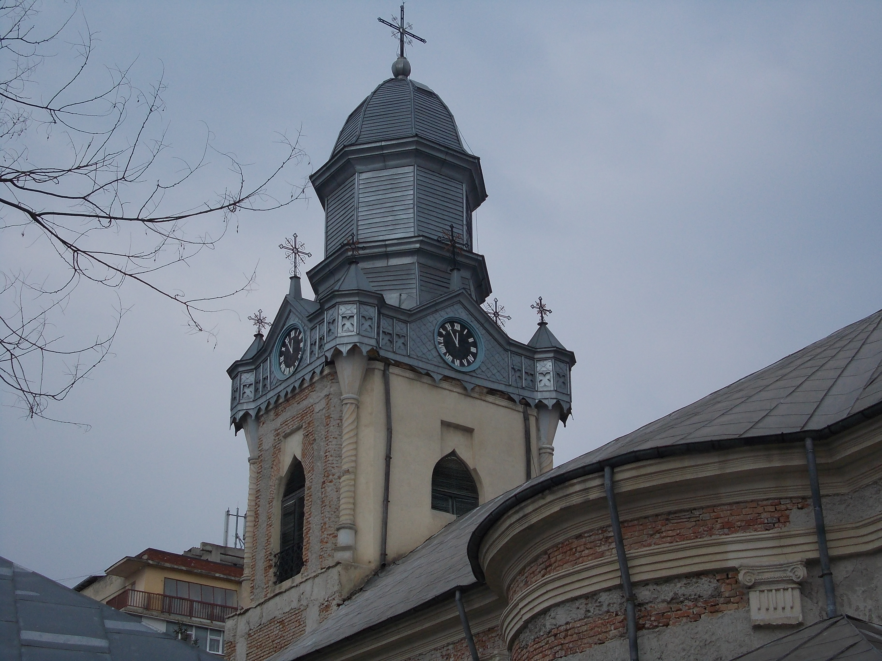 turla bisericii Sf Dimitrie din Bârlad